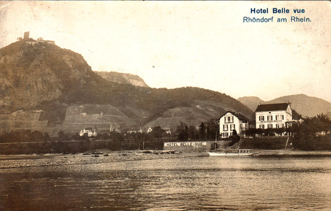 Rheinfront von Rhöndorf mit dem Hotel Bellevue: Ansichtskarte, postalisch gelaufen ab 31. Dezember 1913